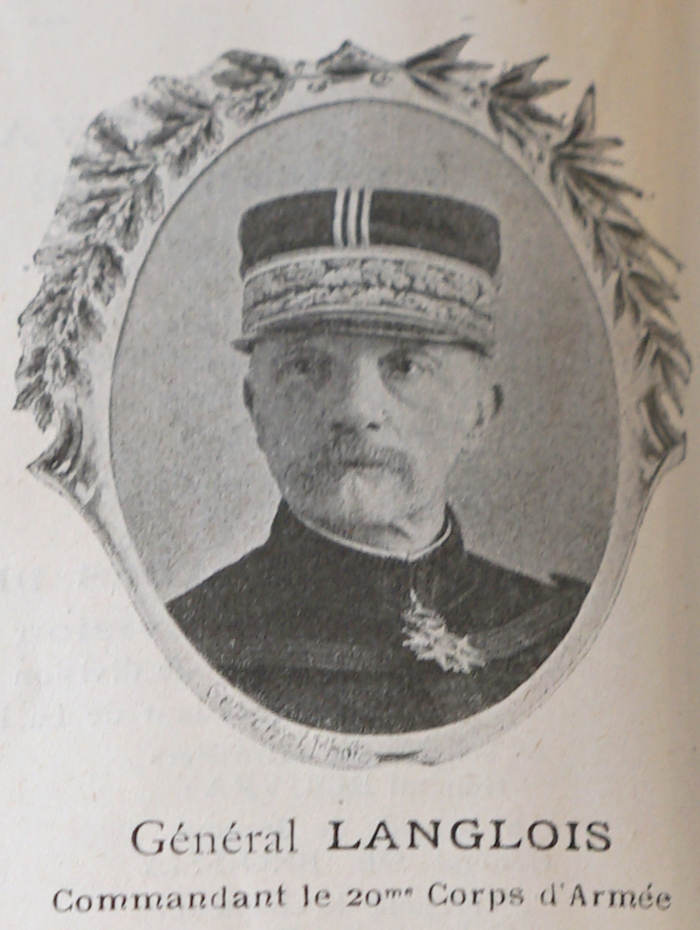 BM Reims sous la cote CPA t4.